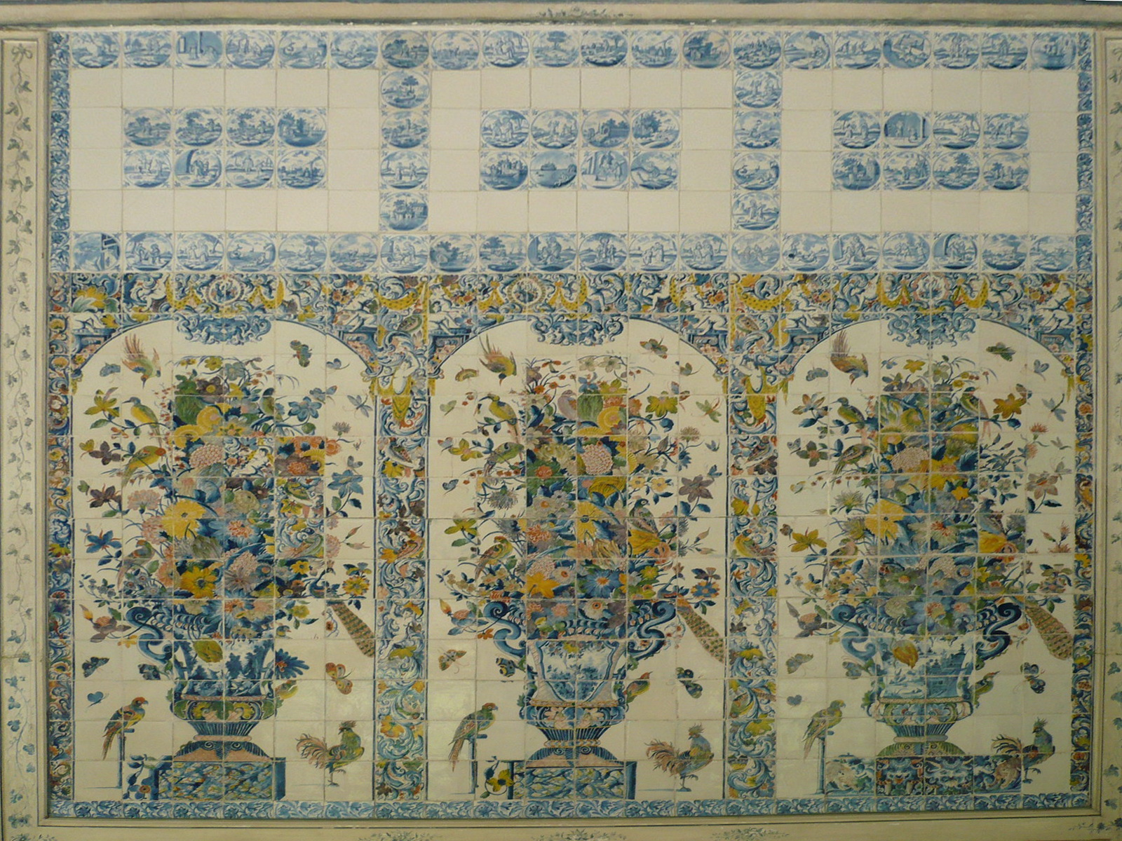 Künchenfließen der Amalienburg in Schloßpark Nymphenburg